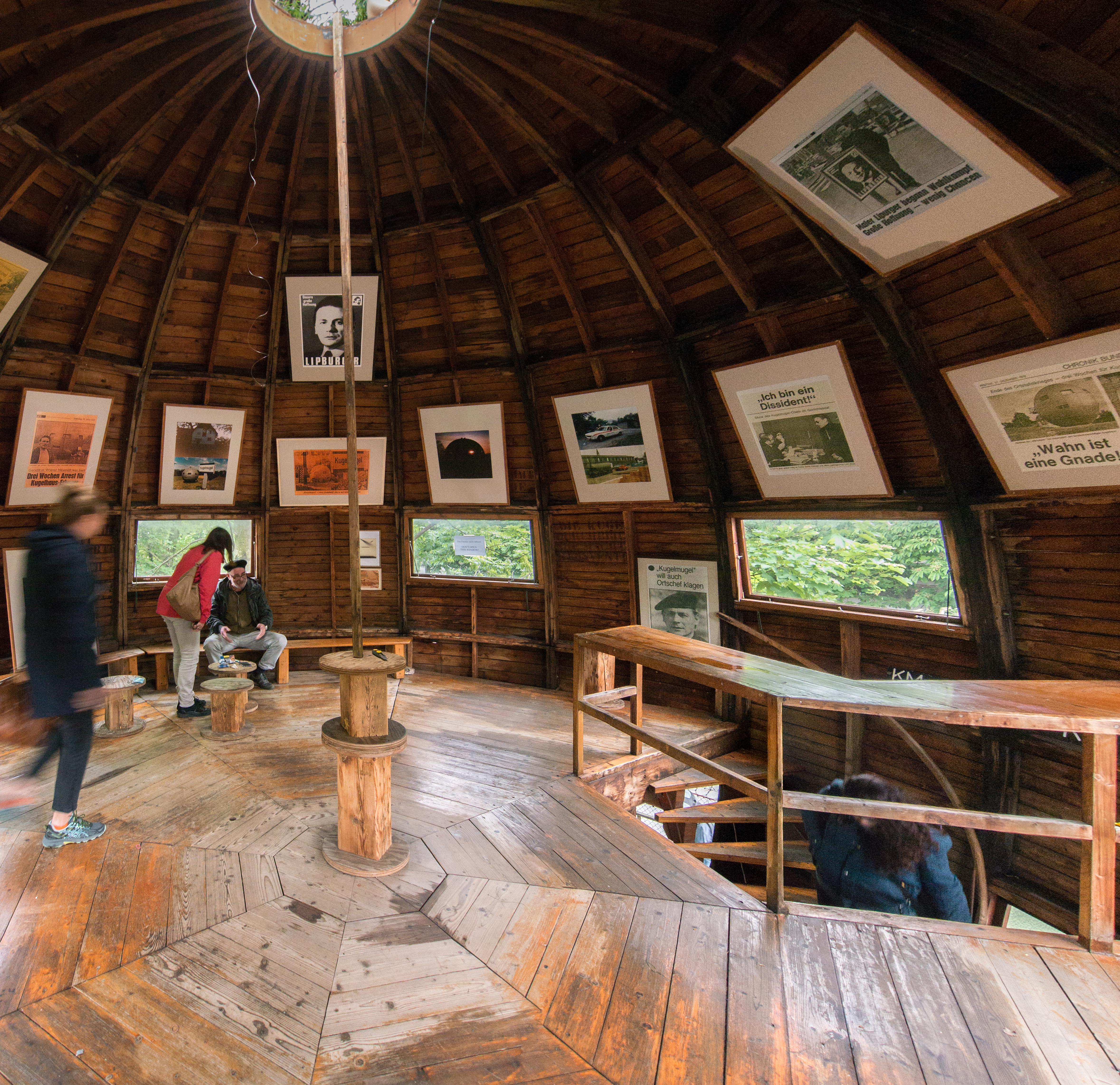 Kugelmugel innen